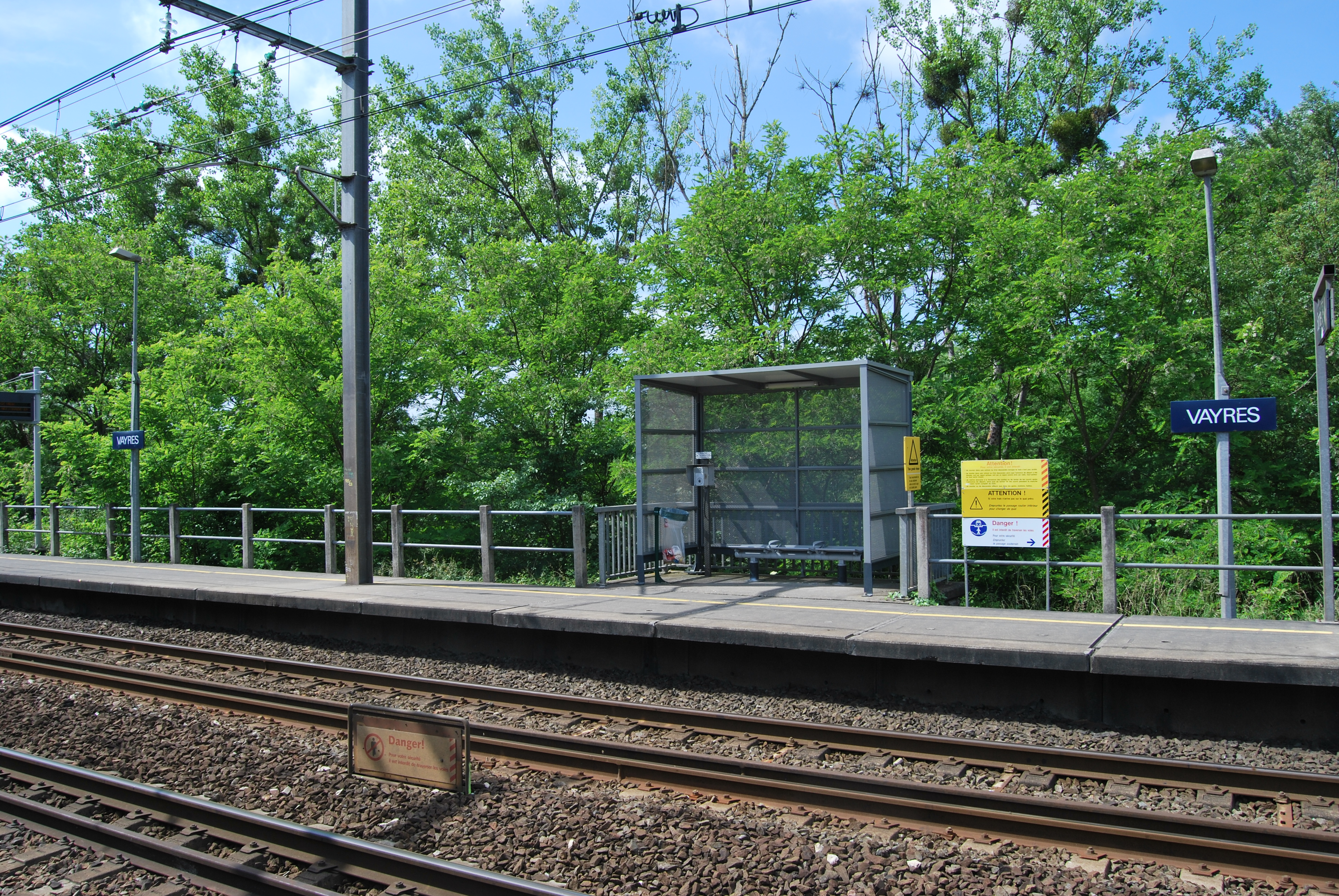 Vayres